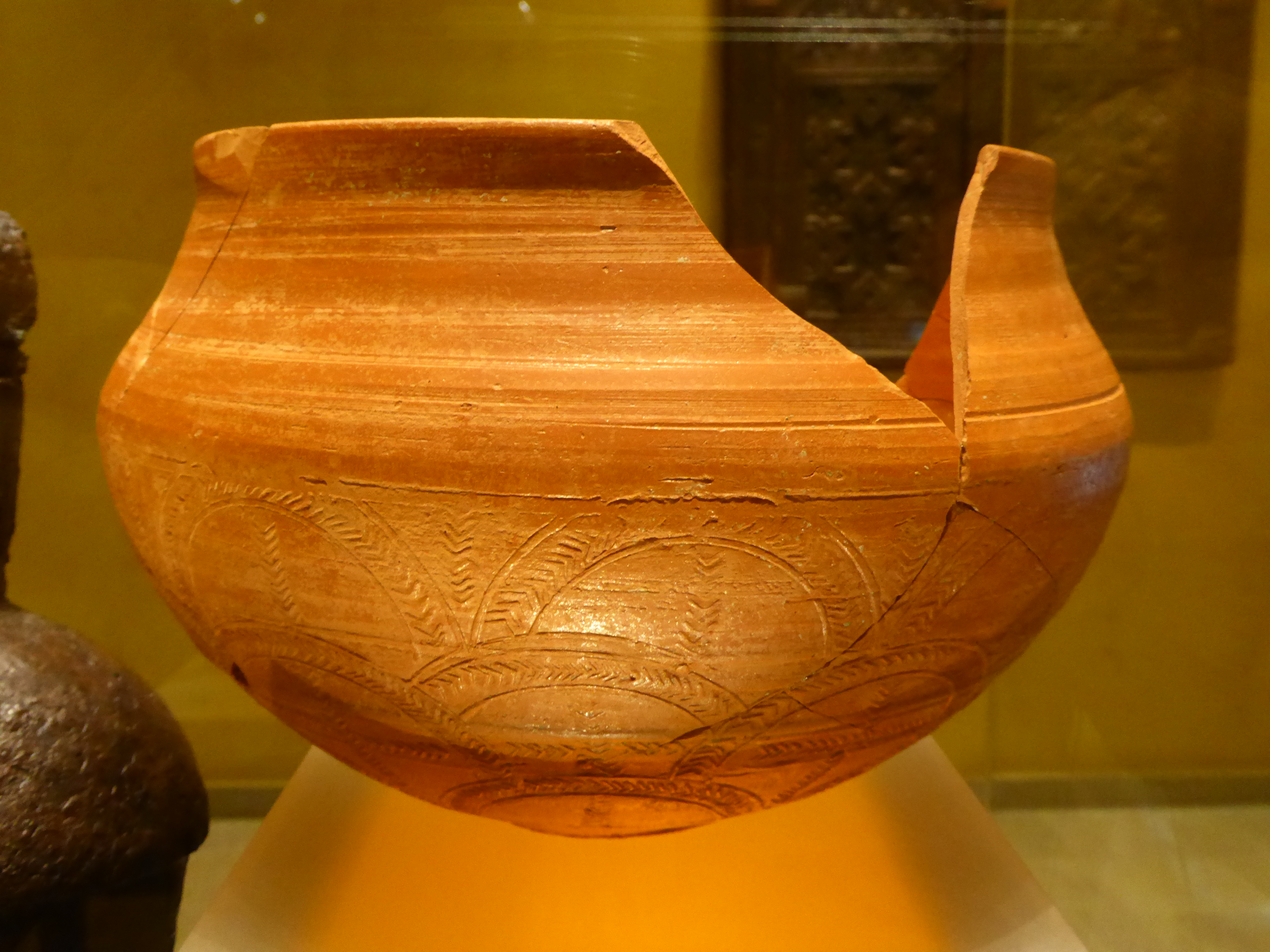 Fuente de cerámica del siglo IV o V. Terra sigillata hispánica tardía de los talleres del Valle Medio del Ebro. Fuente para el servicio de mesa, decorada con temas circulares y espigas. Museo del Teatro Romano de Caesaraugusta